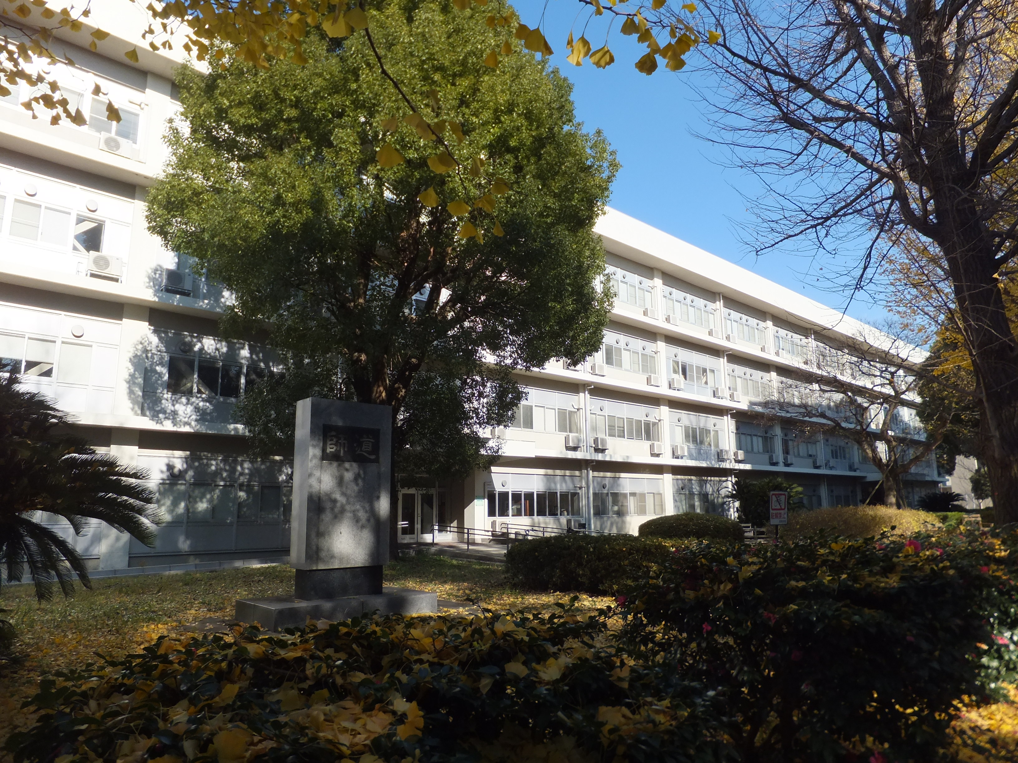 千葉大学教育学部